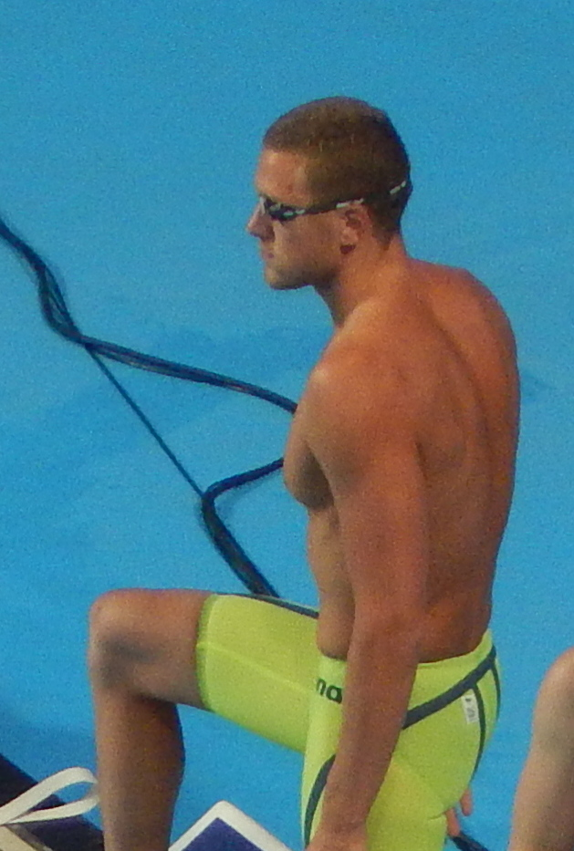 Гречин, Говоров и Фратус на чемпионате мира по плаванию в Казани